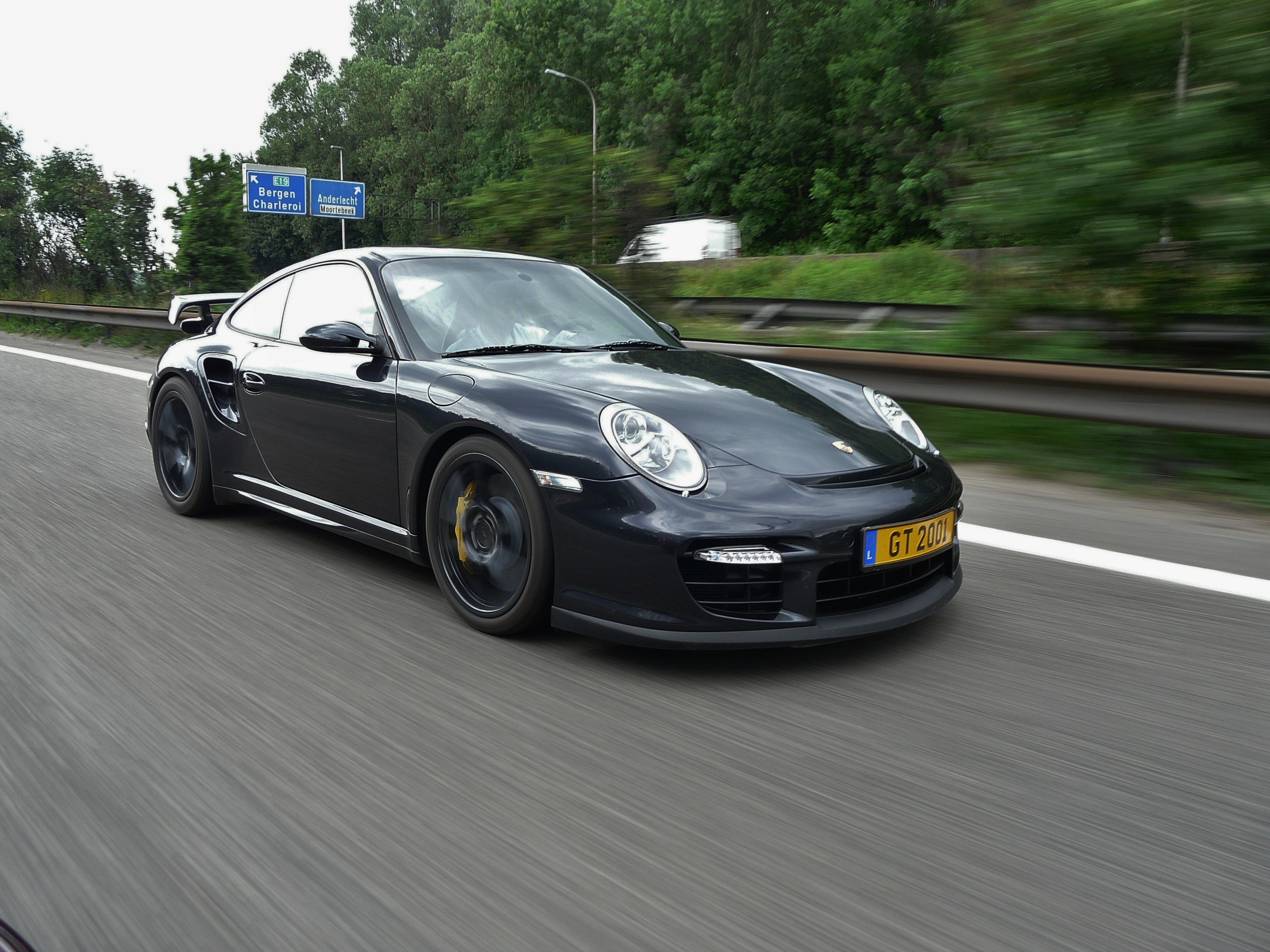 I just like this shot.